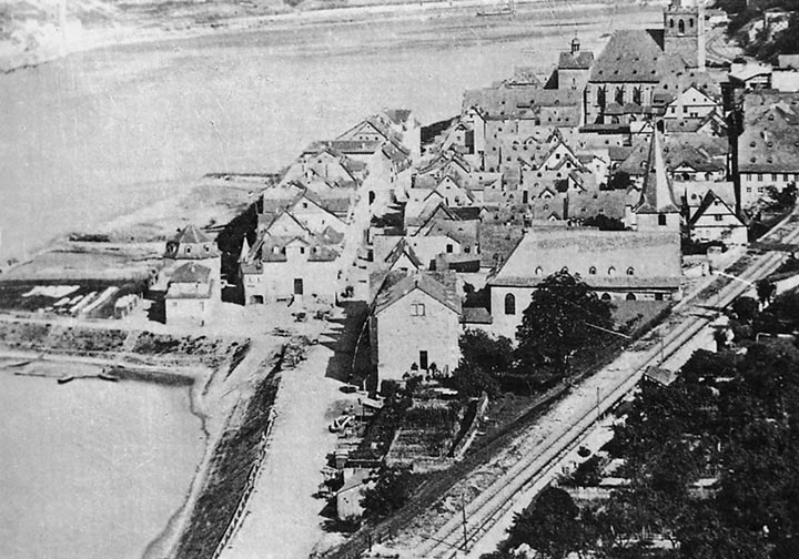 St. Goar